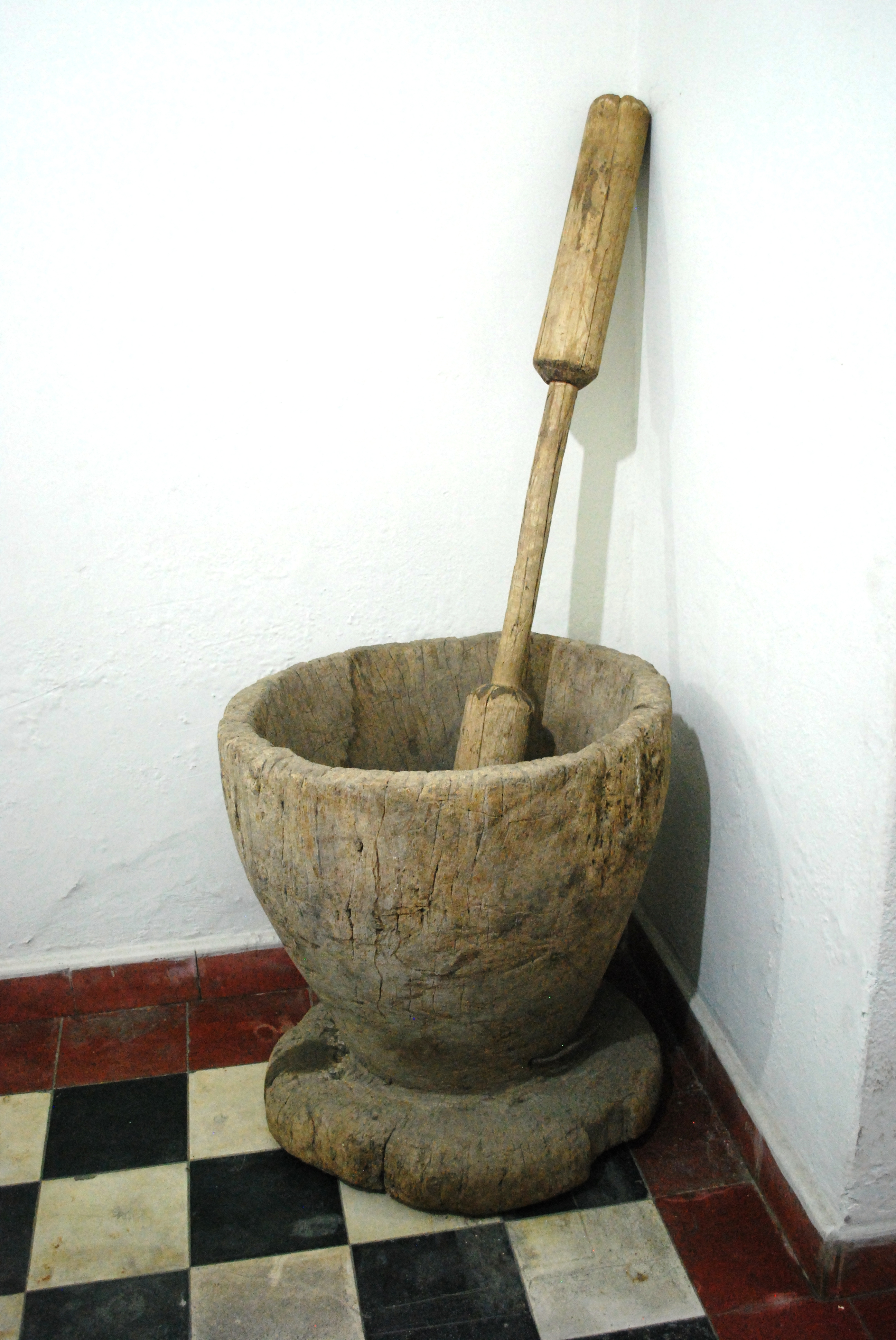 Mortar and pestle for grinding coffee on display at the San Rafael Museum in San Rafael, Veracruz